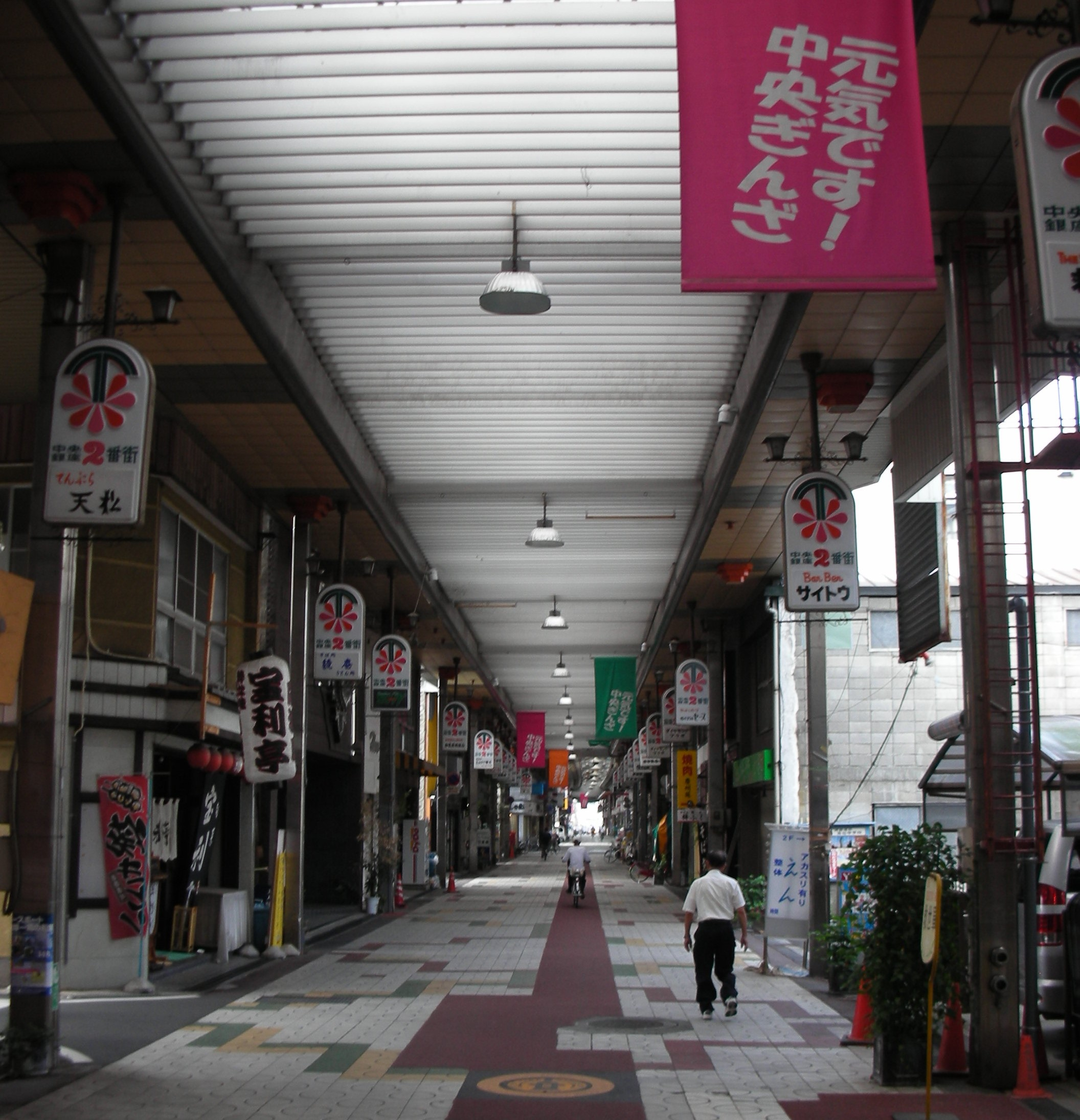 群馬県高崎市 中央銀座商店街